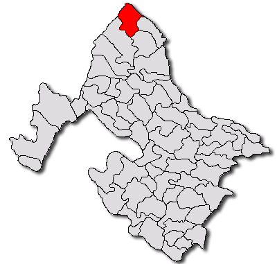 Categorie:Hărţi ale judeţului Mehedinţi